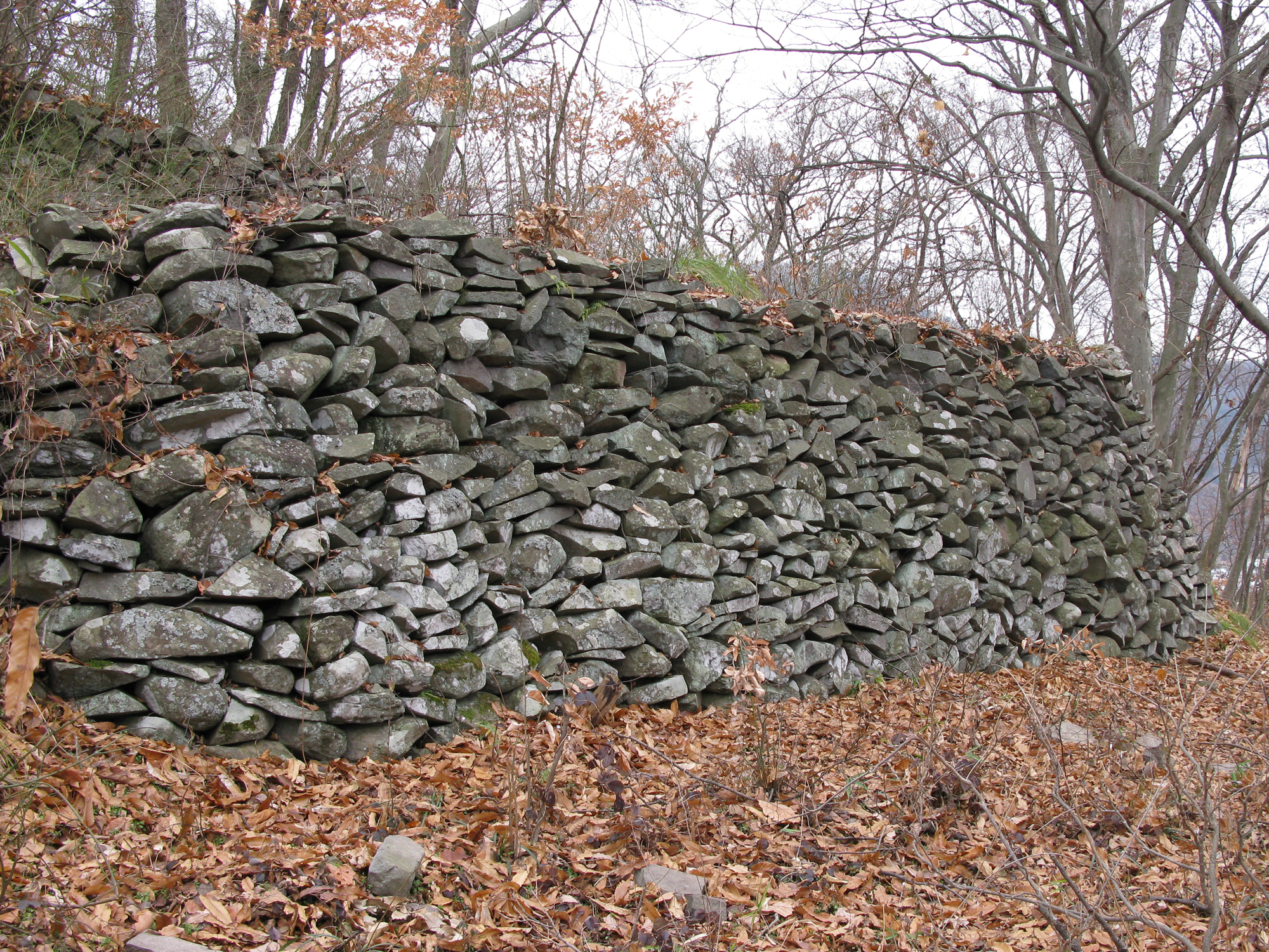 霞城